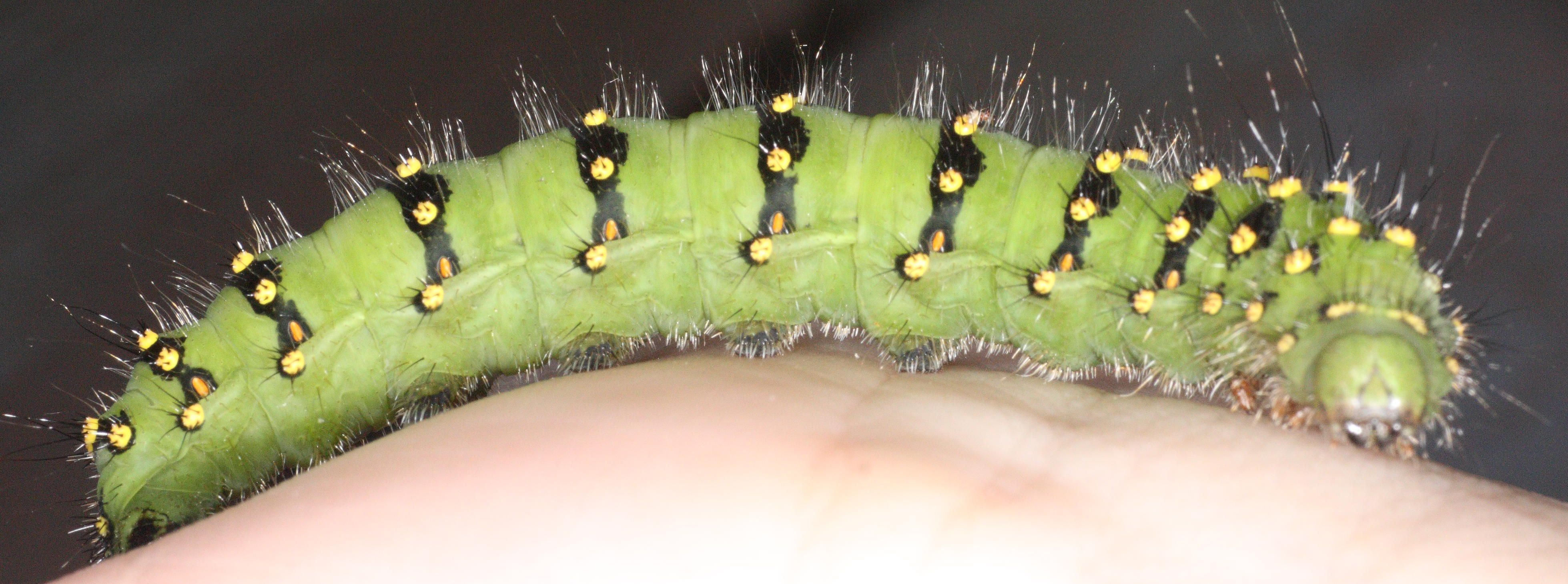 Larver av nattpåfugløye Saturnia pavonia blir grønne med skarpe svarte og grønne tegninger når de blir større. Template:Byline